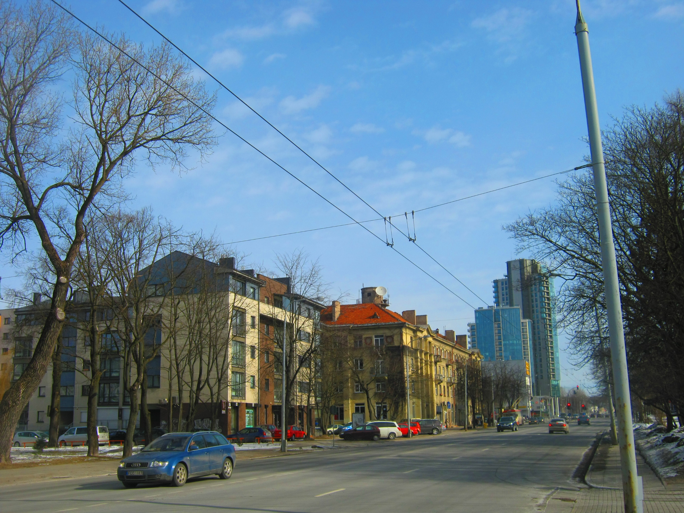 Vilnius